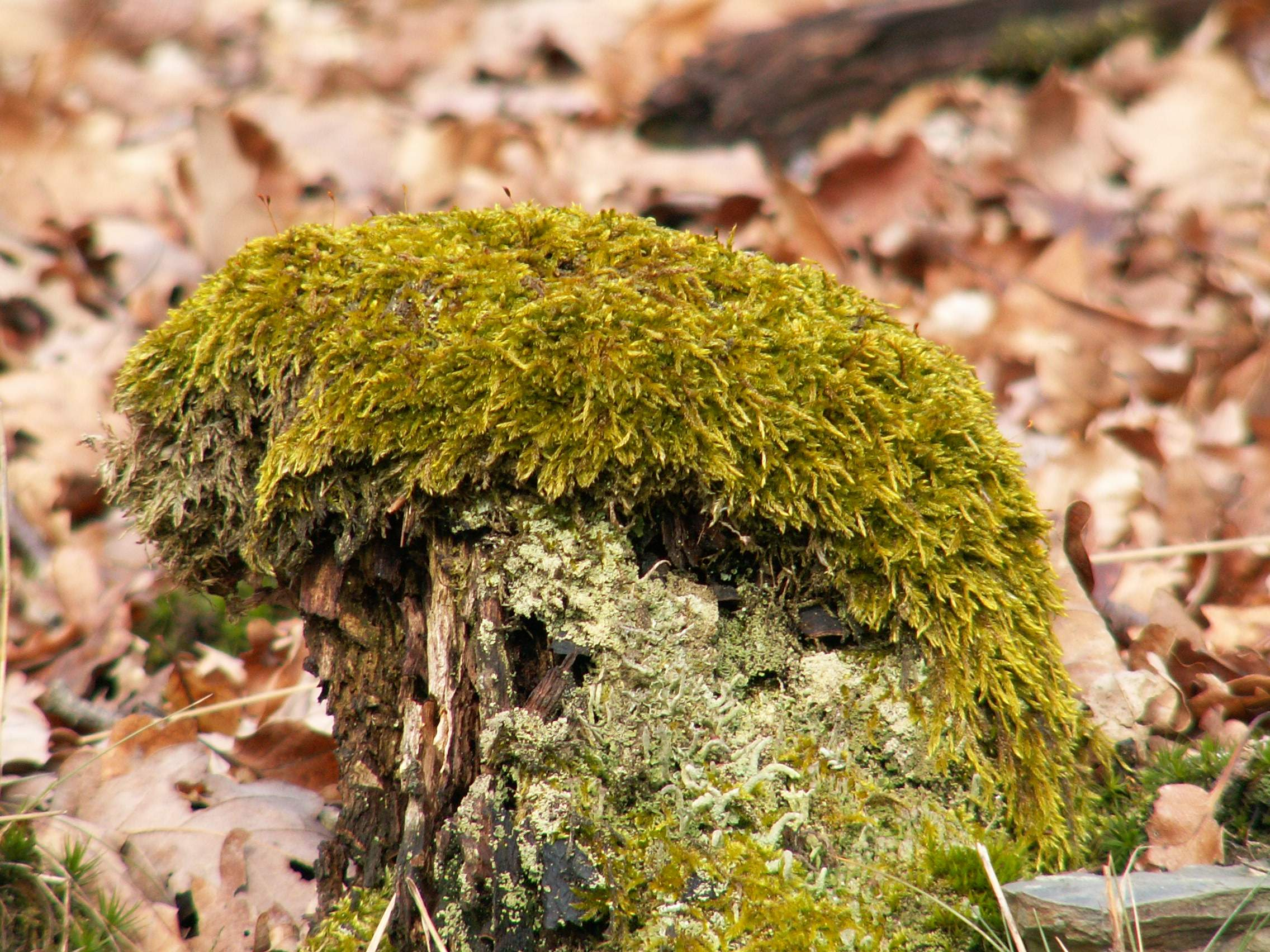 Zypressenschlafmoos (Hypnum cupressiforme)